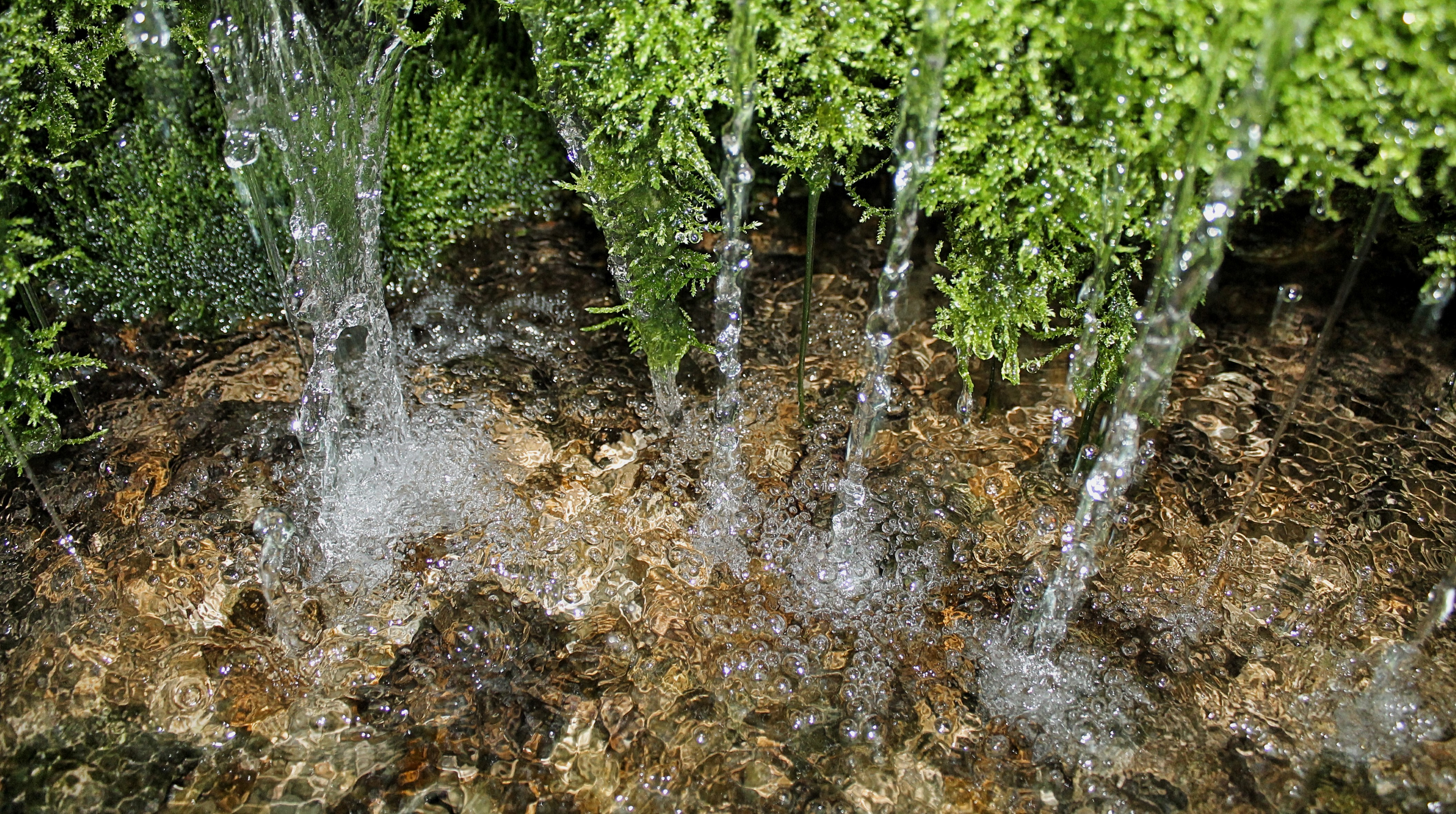 Salevere Salumäe pank (Salevere Salumäe astang, on pank Lääne maakonnas Hanila vallas. Lätet peetakse pühaks. Tema vett peetakse ravivaks silmahaiguste puhul. Ilmselt on teda kasutatud 18.-19. sajandil, võimalik, et ka varem. Ka tänapäeval on turistidel kombeks allikavett juua, sellega silmi pesta ning asemele mõni münt poetada.